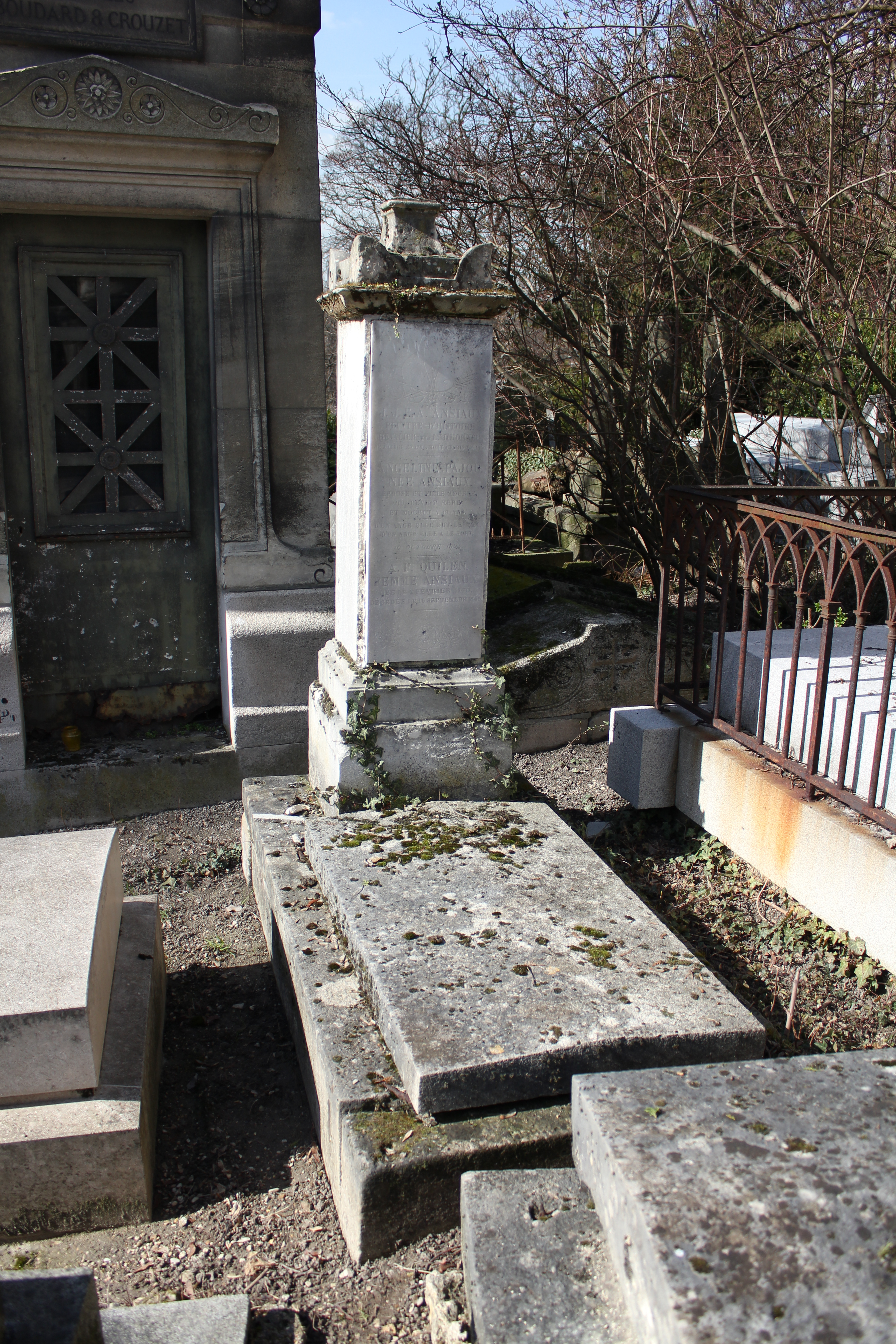 vue générale, face avant